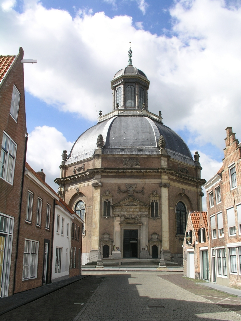 Oostkerk, Middelburg (Netherlands)